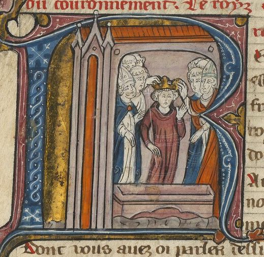 Couronnement d'Amaury Ier